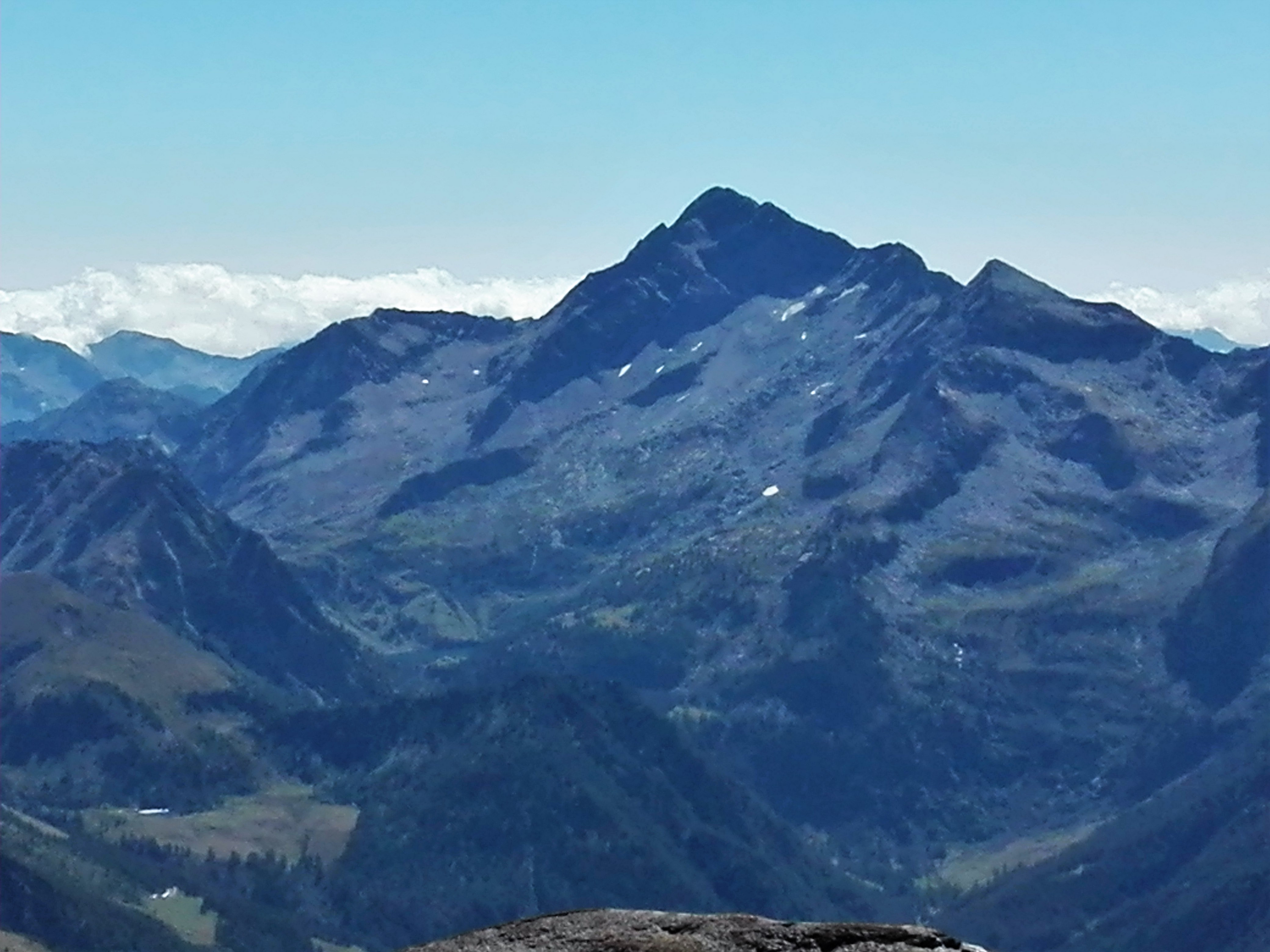 La Becca Frudiera (o mont Nery) vista dal Corno Bussola